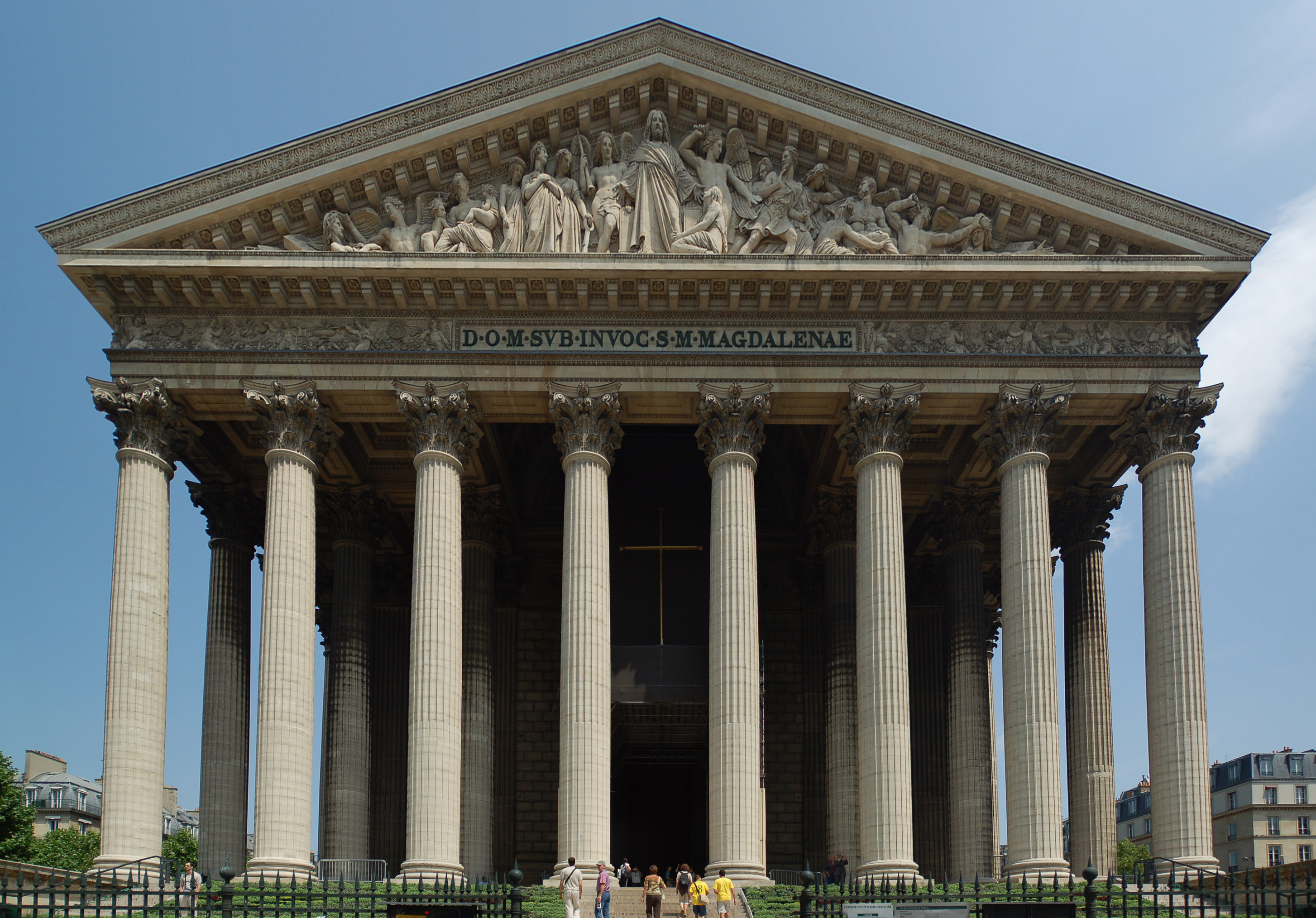 Vue extérieure de l'église de la Madeleine, Paris